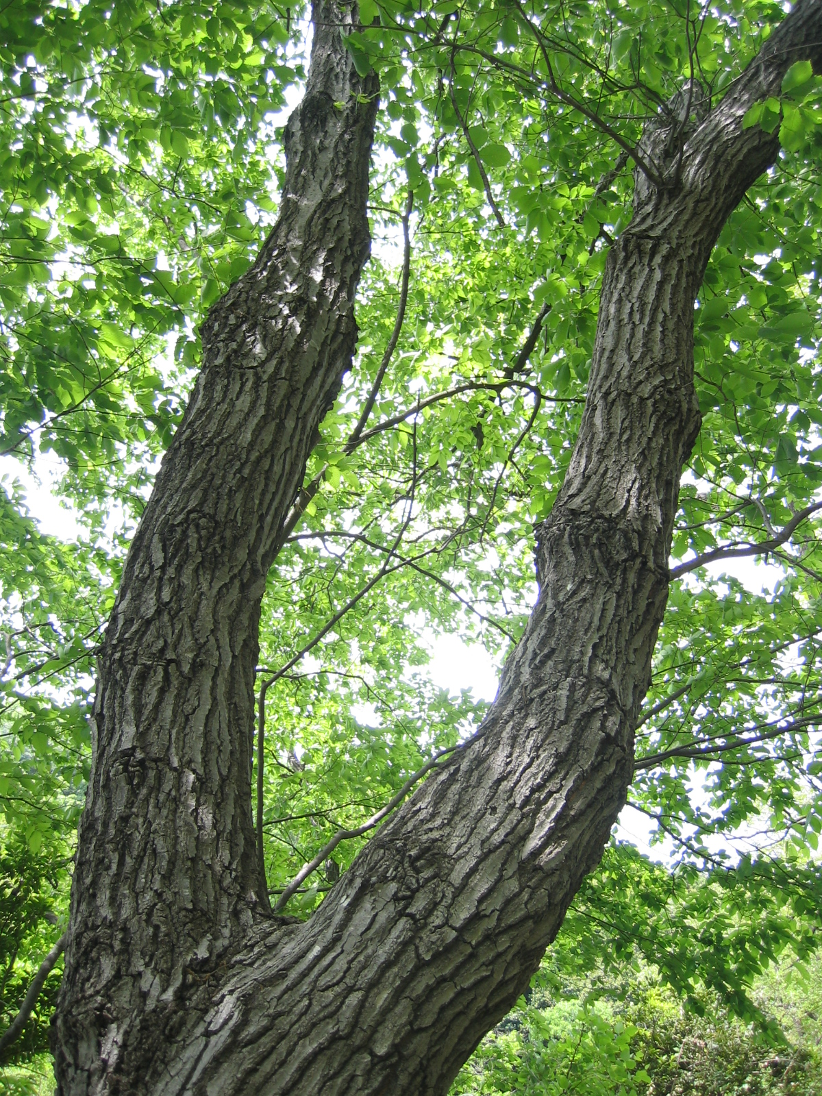 コナラ (学名:Quercus serrata)